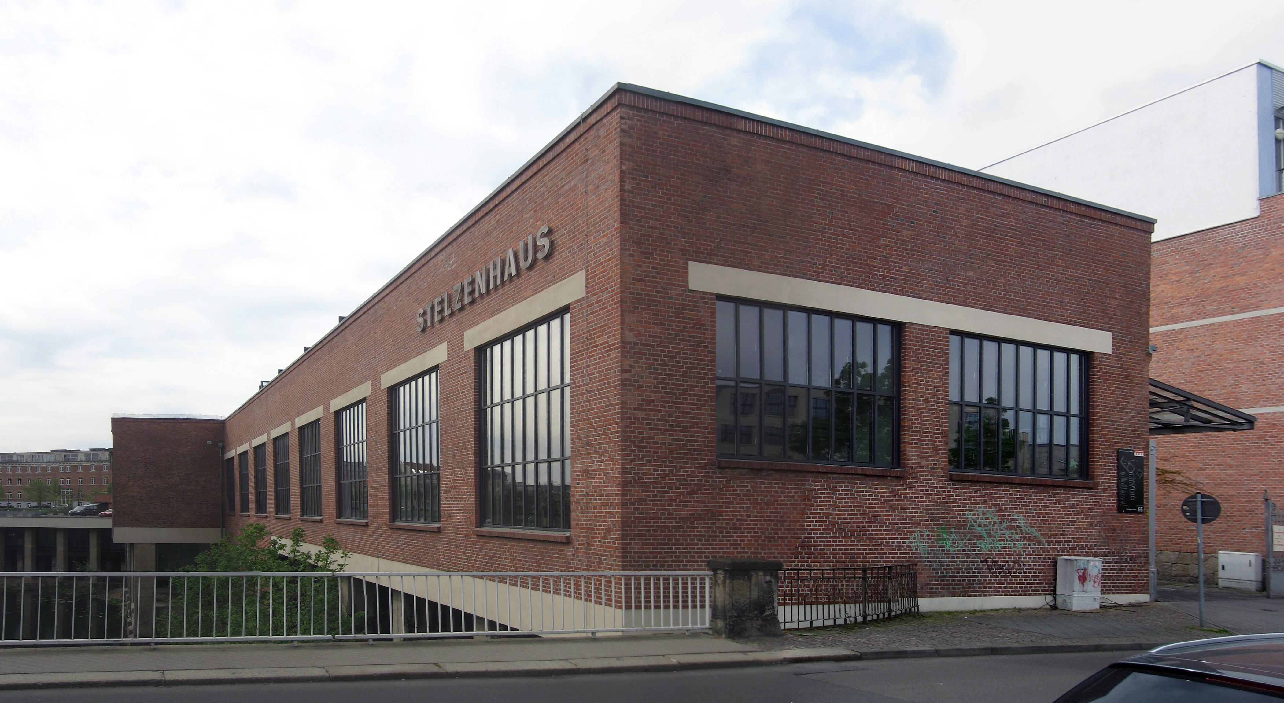 Stelzenhaus in Leipzig-Plagwitz von der Weißenfelser Straße aus gesehen